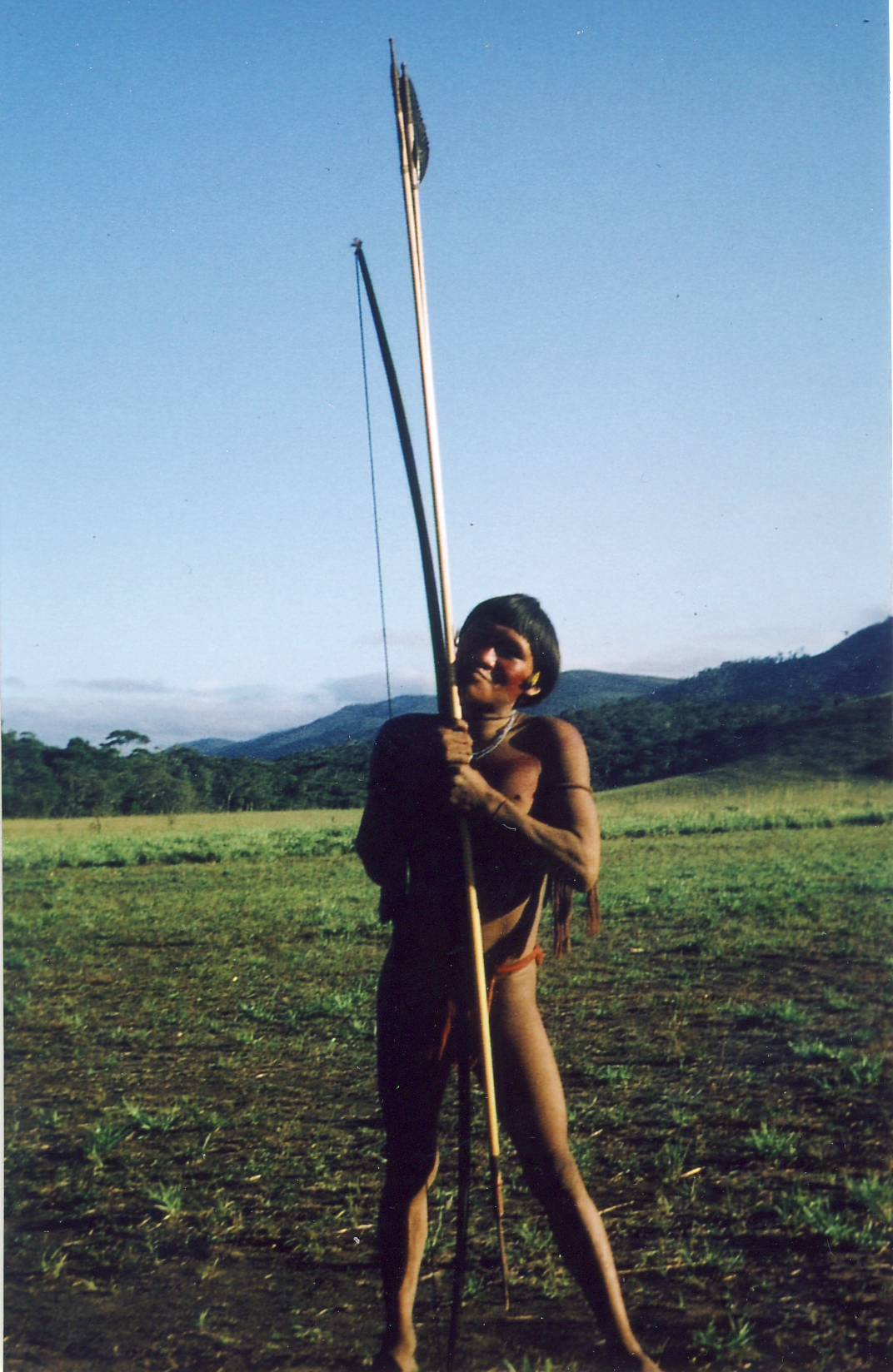 Jäger frühmorgens vor der Jagd